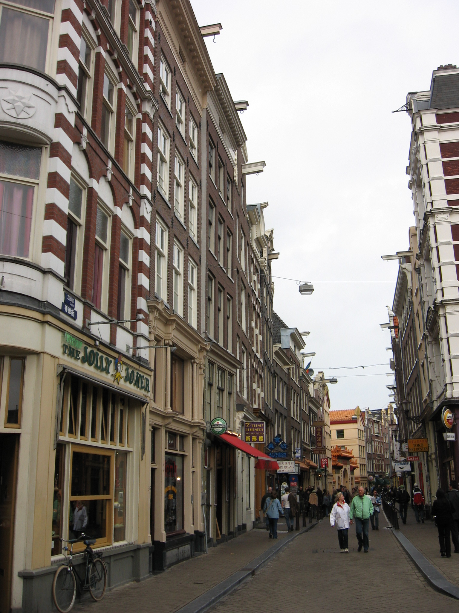 Zeedijk